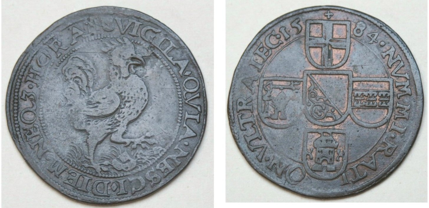 Rekenpenning Utrecht 1584, waakzaamheid geboden. Foto van eigen exemplaar